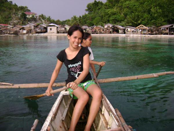 Magsaysay